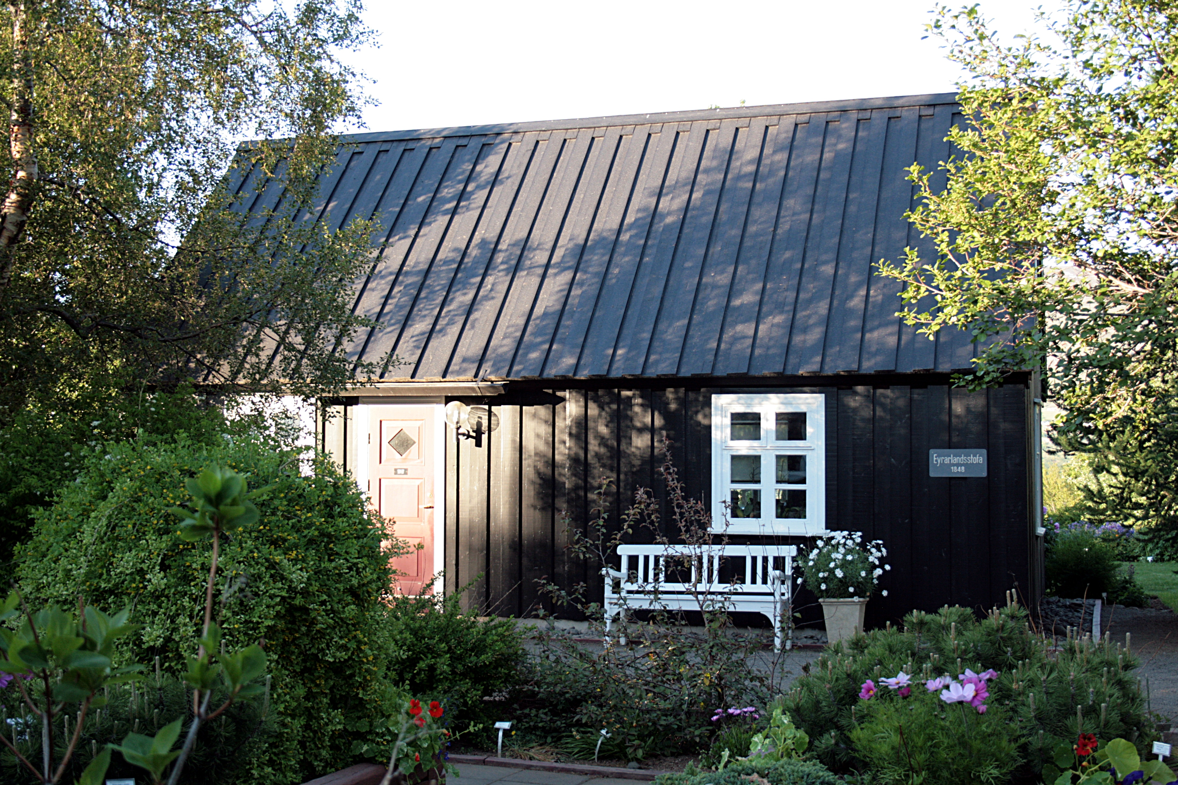 Ísland, Akureyri Botanical Gardens: Eyrarlandsstofa